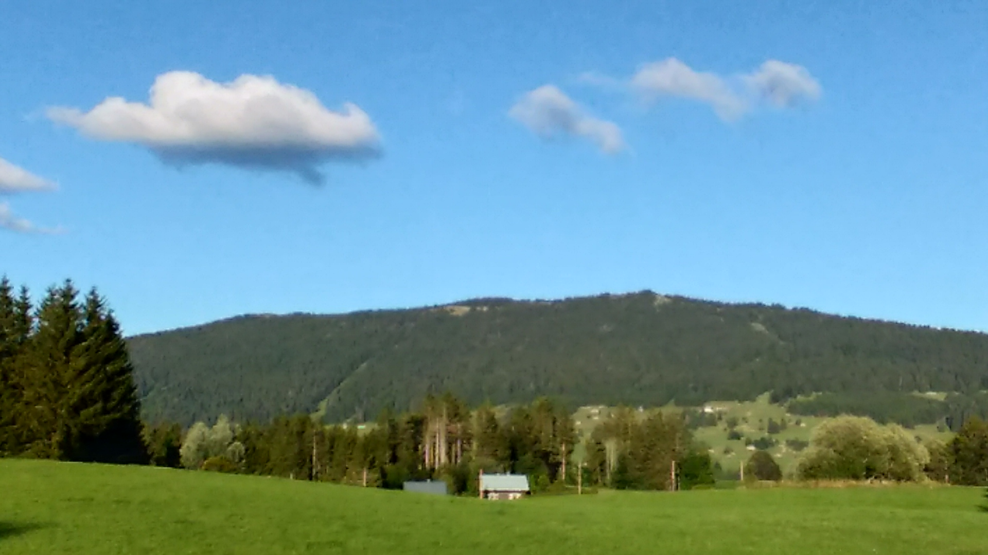 Vue du Noirmont depuis Les Rousses, août 2019